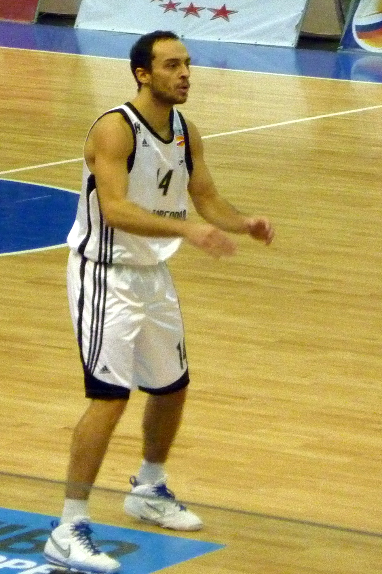 Зашитник БК «Нижний Новгород» Вукашин Алексич в матче против БК «Енисей» 18 декабря 2010 года